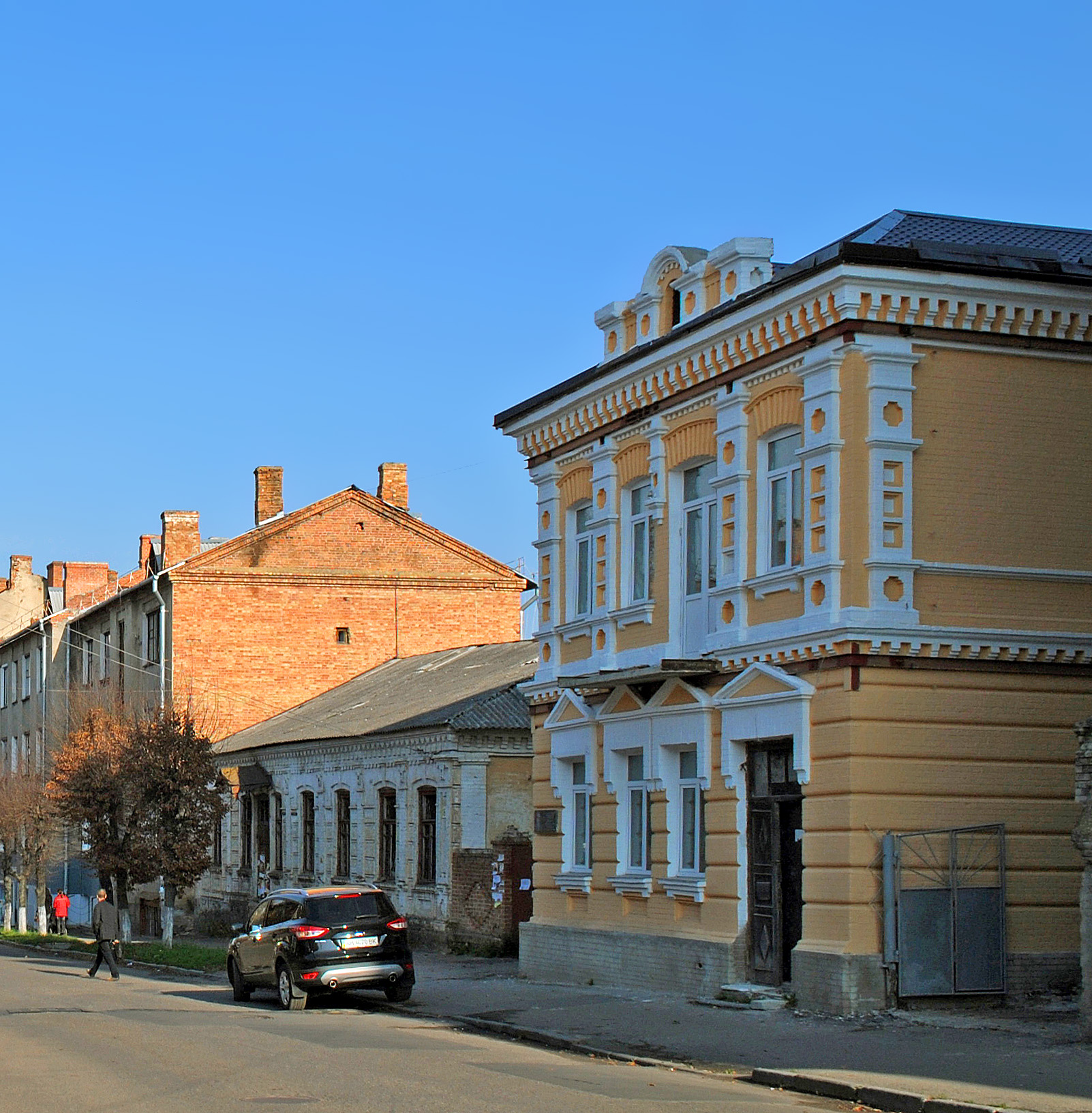 Особняк В. С. Гроссмана, Бердичів, вул. Шевченка, 14